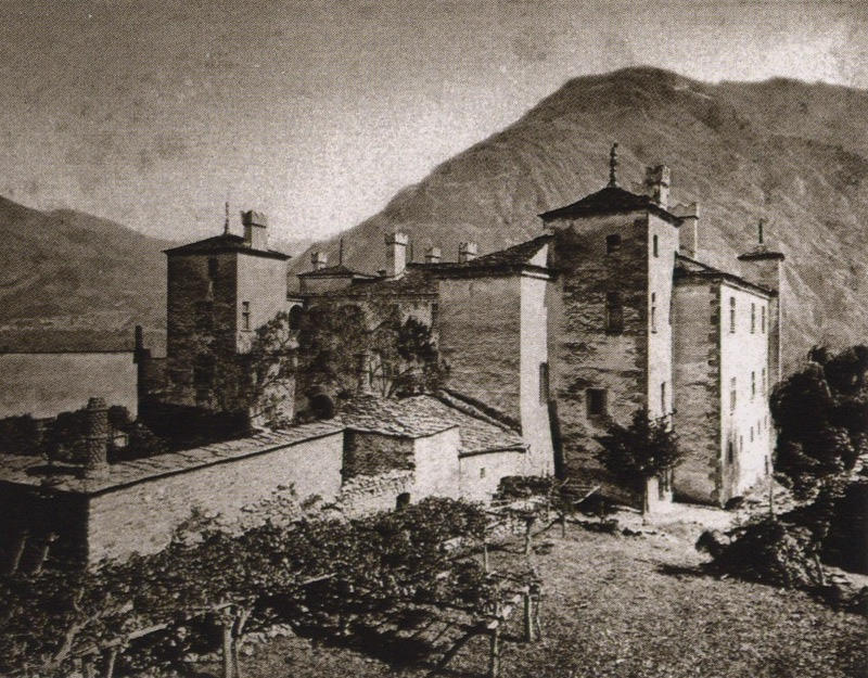 Veduta del Castello di Issogne da sud in una foto di Vittorio Ecclesia (1847 - 1928). Pubblicata in G. Giacosa, V Avondo, Il Castello di Issogne in Val d'Aosta, Torino, 1884. Questa scansione fatta da Patafisik deriva da una foto di R. Gonella a tale libro, pubblicata successivamente nel libro segnato come fonte.